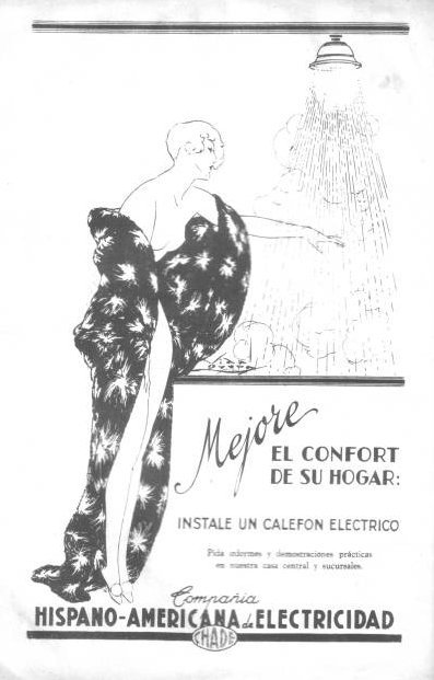 Publicidad de la CHADE, desaparecida empresa de electricidad en concesión del servicio de la Ciudad de Buenos Aires. Desaparecida en 1936.